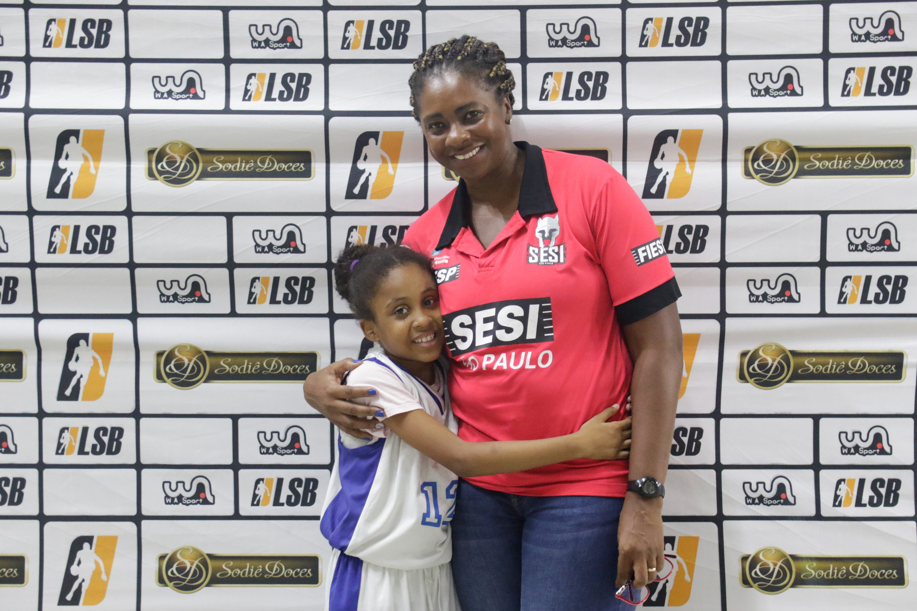 Roseli Gustavo em partida válida pela LBF 2019 contra a equipe LSB/RJ na Arena de Deodoro.